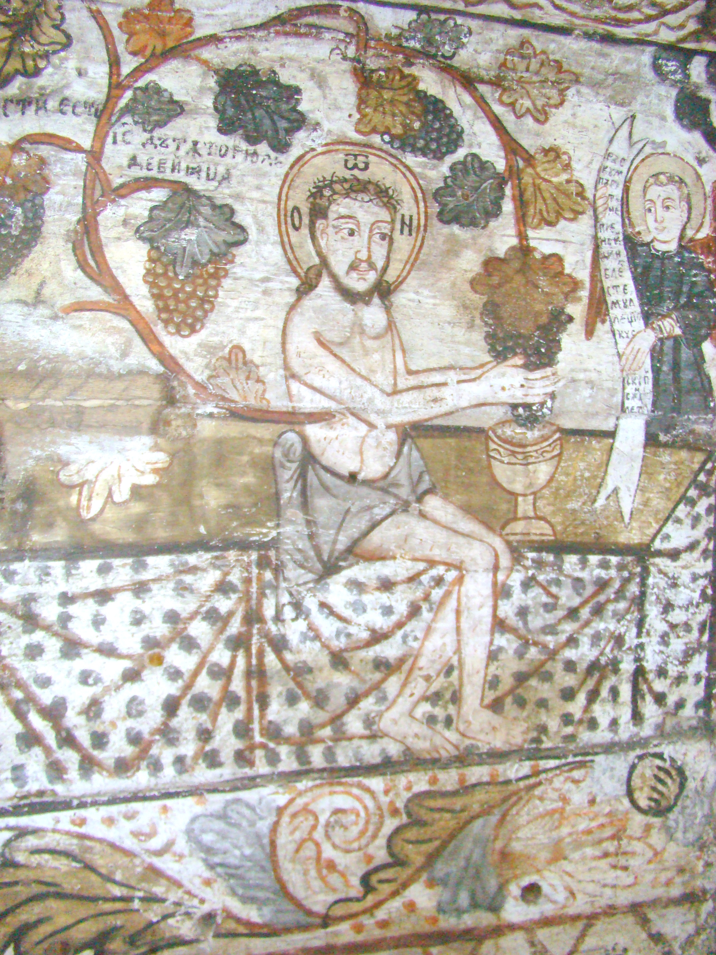 Biserica de lemn „Nașterea Maicii Domnului” din Călinești-Căeni, județul Maramureș